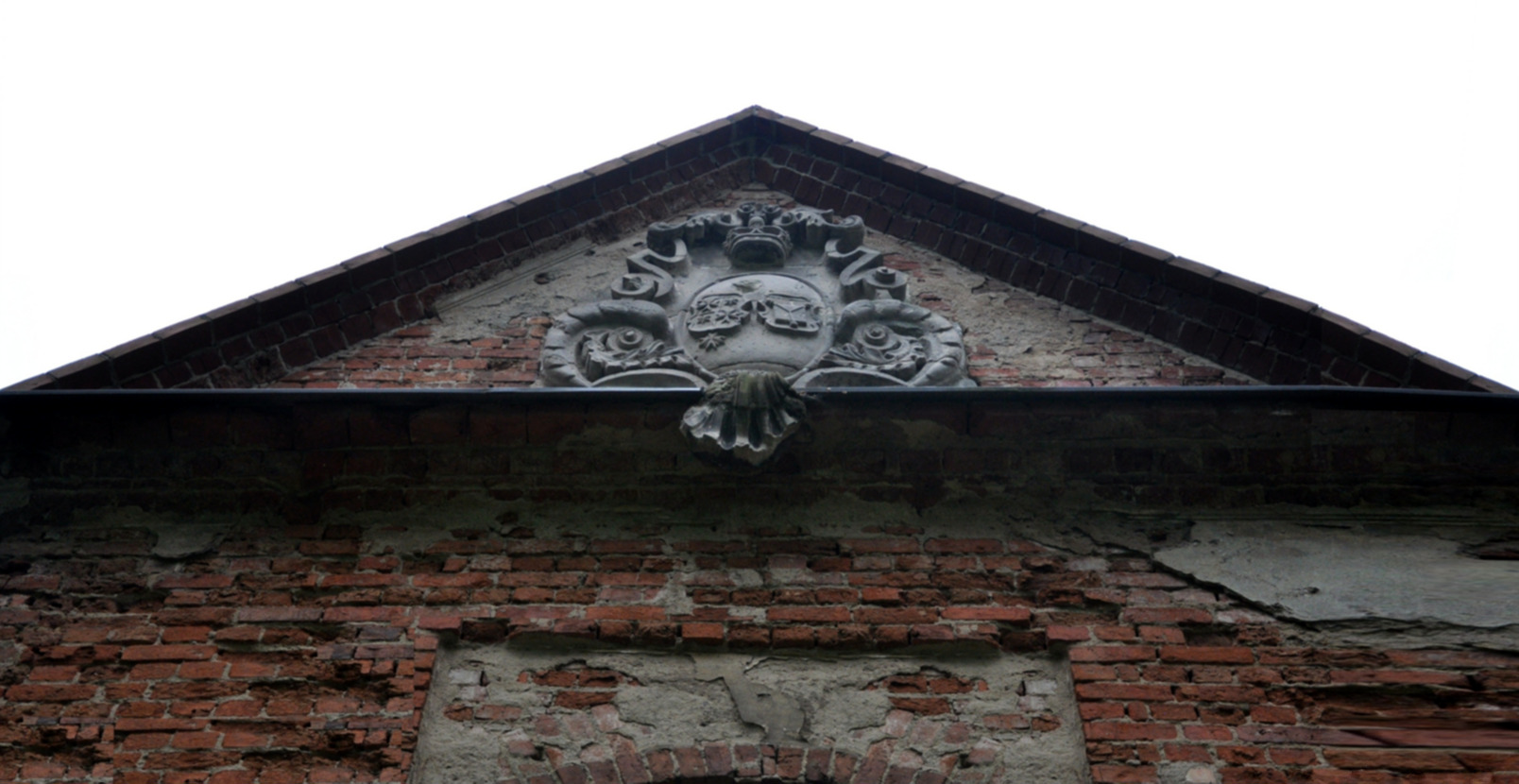 Dorfkirche (Ruine) - Wappen von Adolph Friedrich von Beerfelde